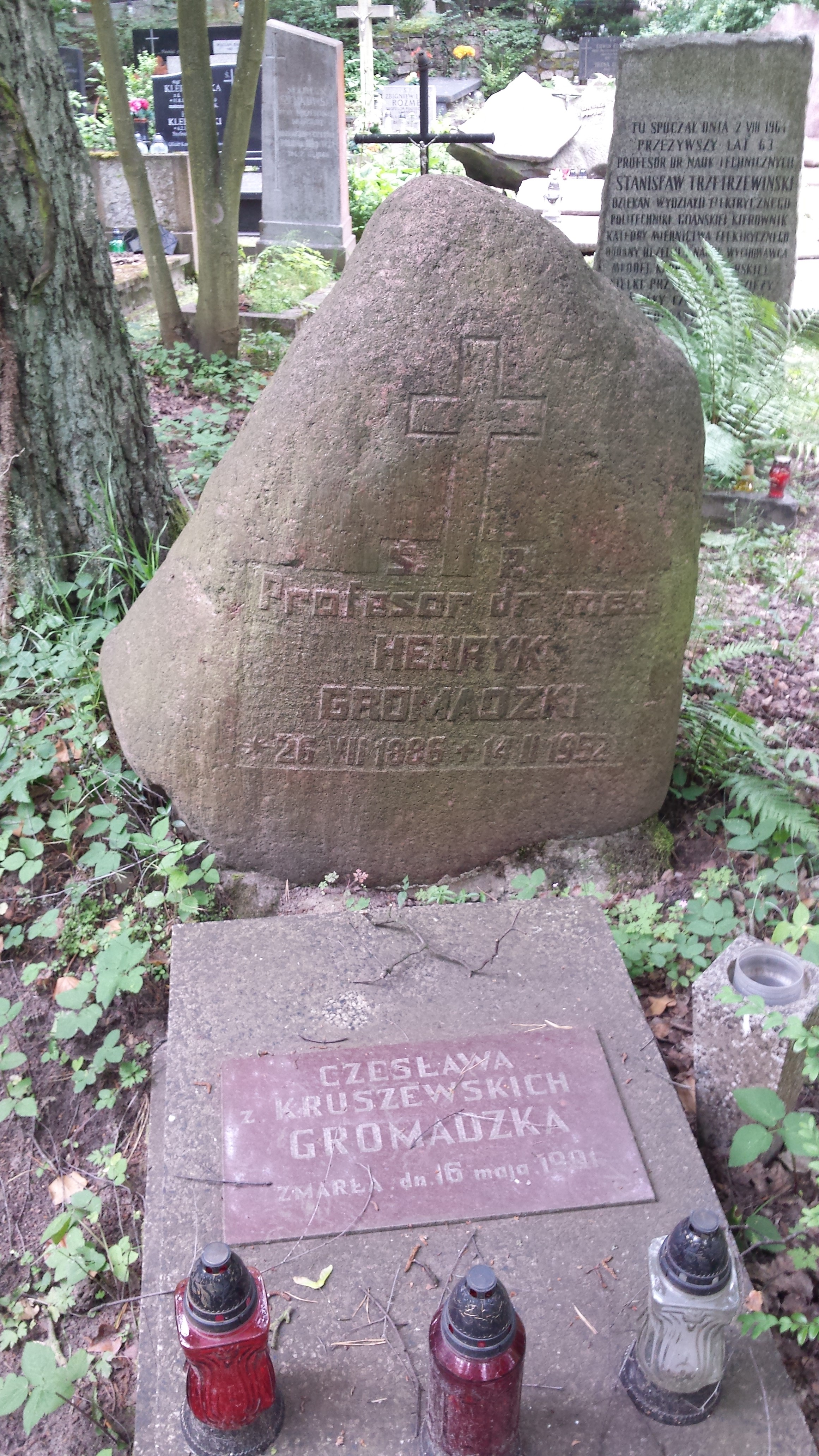 Grób ginekologa i położnika prof. Henryka Gromadzkiego (1886-1952) na cmentarzu Srebrzysko w Gdańsku.